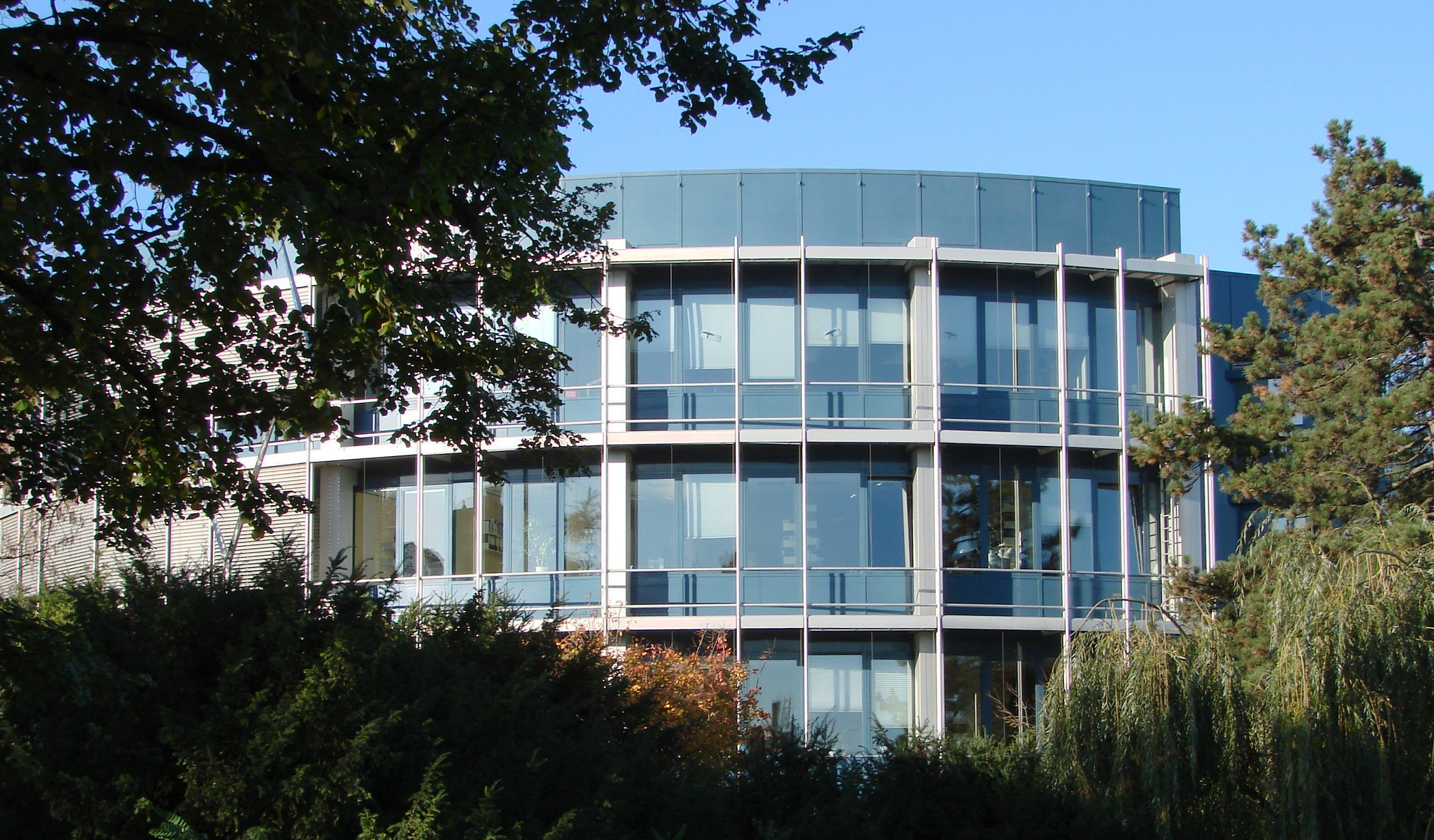 Thieme Verlagsgruppe, main house, built in 1981